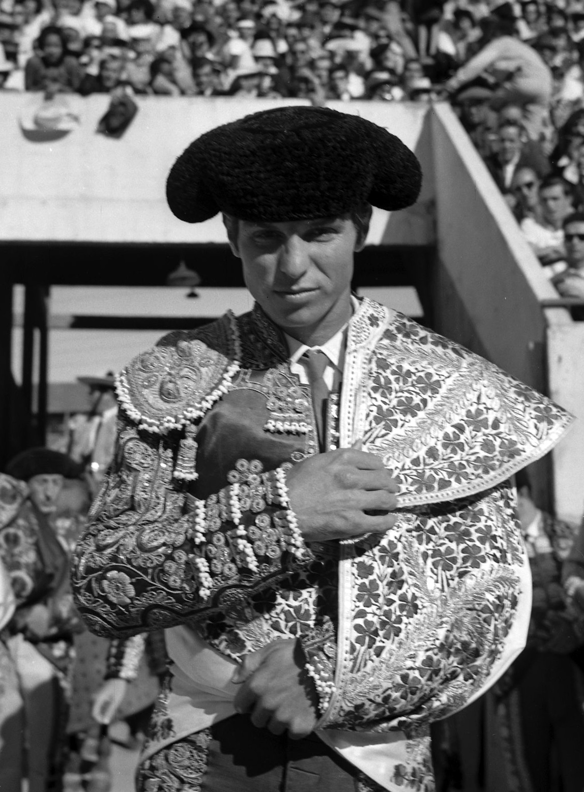 Les arènes de Toulouse. 19 Septembre 1965. Vue de l'entrée du torero El Cordobès dans les arènes de Toulouse.